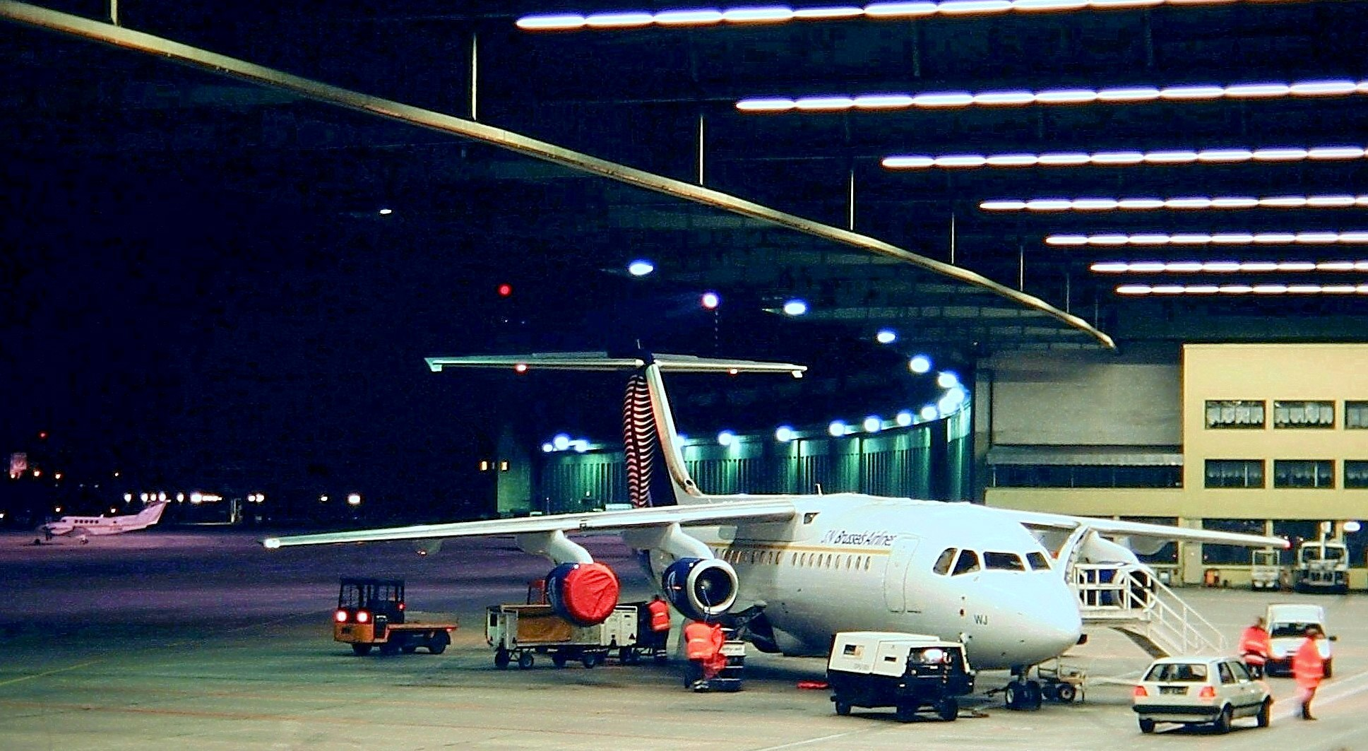 Bae 146 der Brussels Airlines, Berlin-Tempelhof